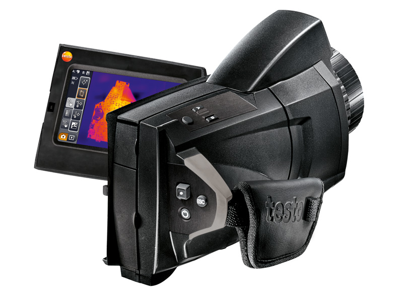 Eine Wärmebildkamera aus dem Hause Testo, mit der beispielsweise Gebäude-, Elektro- und Industriethermografie betrieben werden kann.